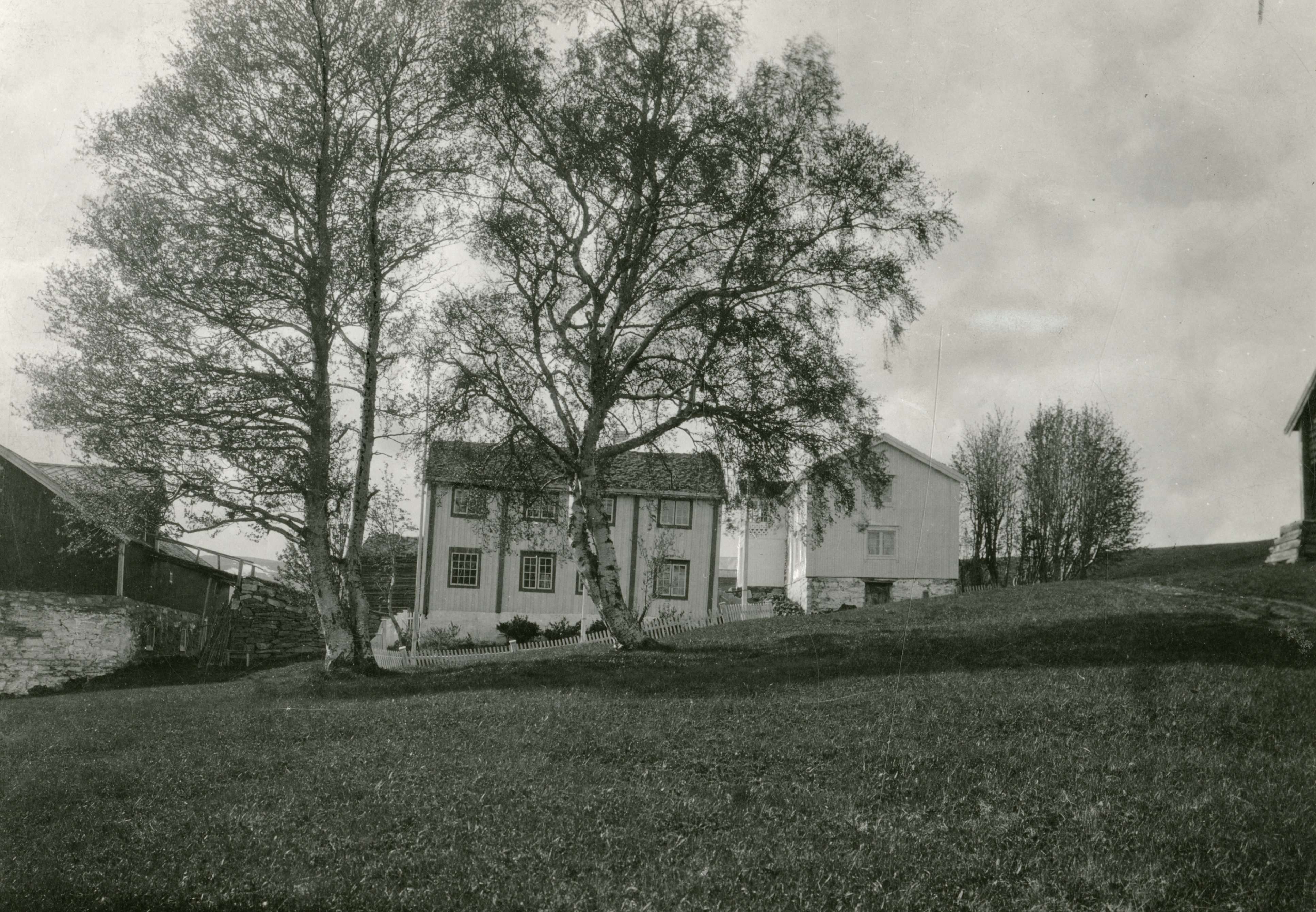 Bjørgan prestegård i Kvikne, Hedmark Forfatteren Bjørnstjerne Bjørnson (1832-1910) ble født her, og bodde her i sine første barndomsår 1832-1837.